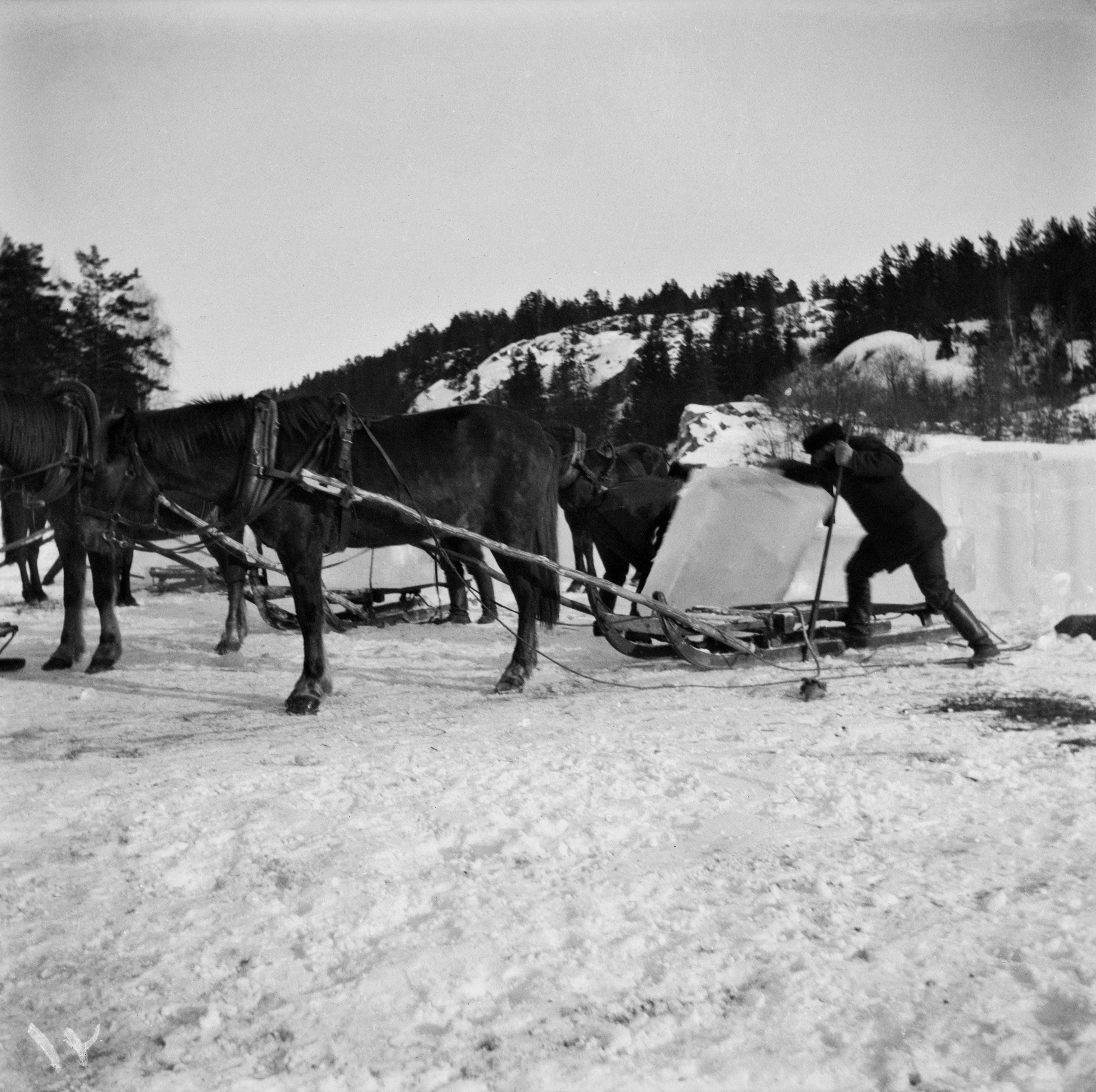 Jäiden lastausta kuljetettavaksi Vantaanjoelta Oulunkylän asemalle.; negatiivi, nitraatti, mv